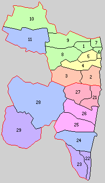 福島県双葉郡の町村。